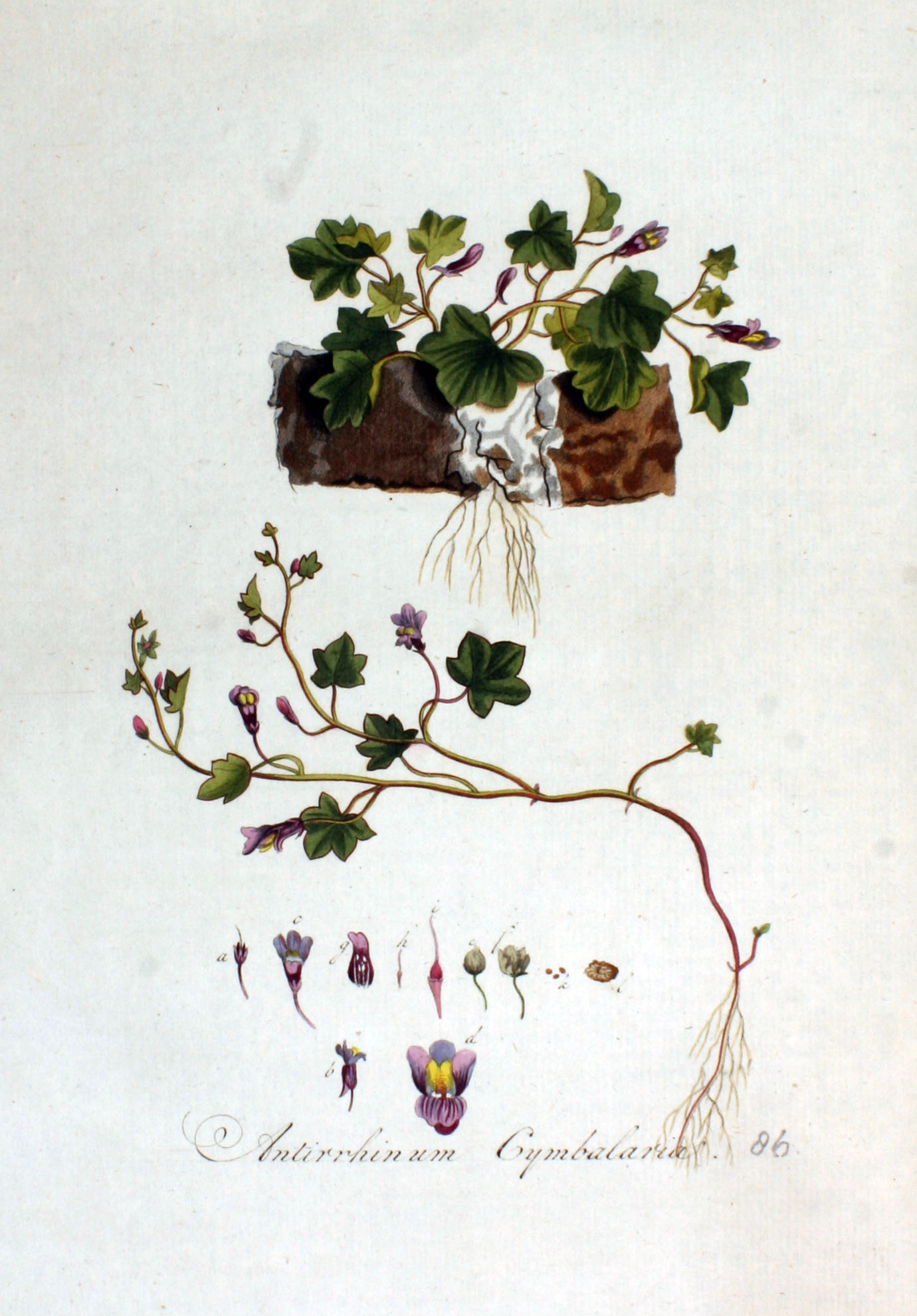 Cymbalaria muralis P.Gaertn., B.Mey. & Scherb. (Syn. Antirrhinum cymbalaria L.)